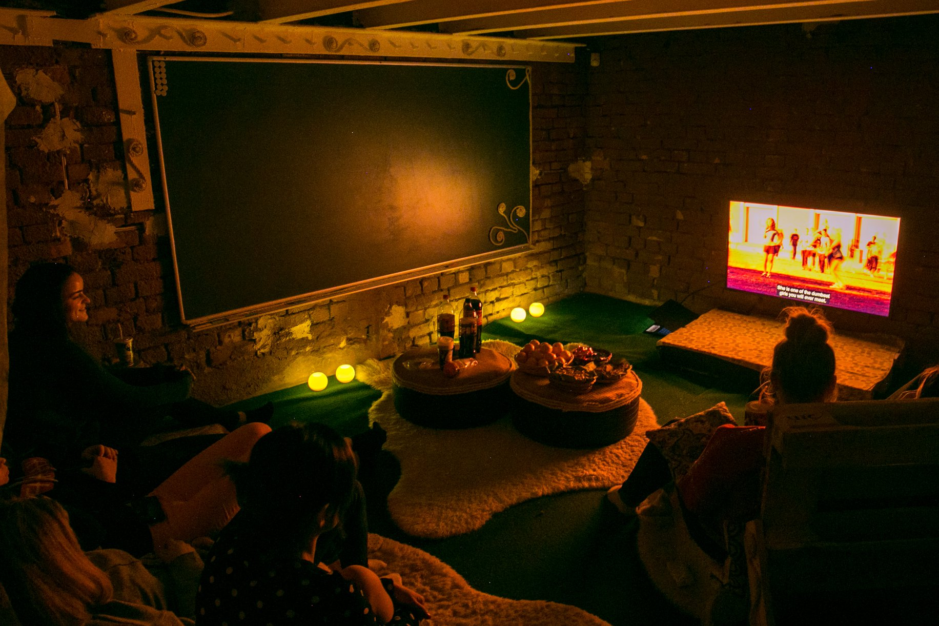 Valga Gümnaasiumi DFK Avasilmas toimus filmiõhtu.